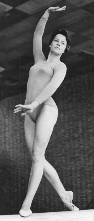 Ute Starke Zentralbild Kohls-Studré 25.6.1964 Turnen: DDR-Aufgebot für Olympia-Ausscheidungen. Für die Olympia-Ausscheidungen mit den Turnerinnen Westdeutschlands am 27. und 28. Juni 1964 in Wolfsburg, sowie am 18. und 19. Juli 1964 in Schwerin hat der Deutsche Turnverband der DDR folgende Aktive nominiert: Erika Barth, Ute Starke (beide SC Leipzig), Birgit Radochla, Ingrid Föst, Rosemarie Heritz, Karin Hannewitz, Brigitte Sax (alle SC Dynamo Berlin), Christel Felgner und Barbara Stolz (beide SC Chemie Halle). UBz: Ute Starke auf dem Schwebebalken. (Kohls)